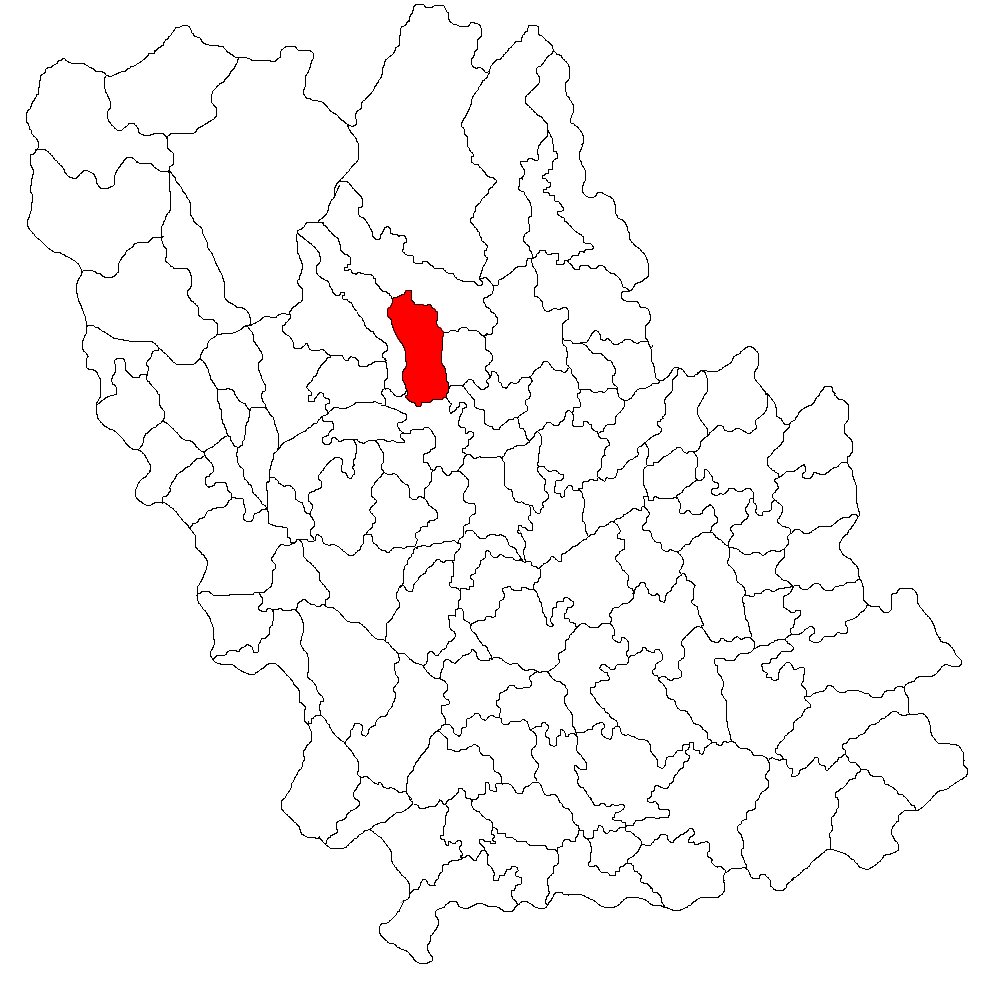 Categorie:Hărţi ale judeţului Prahova